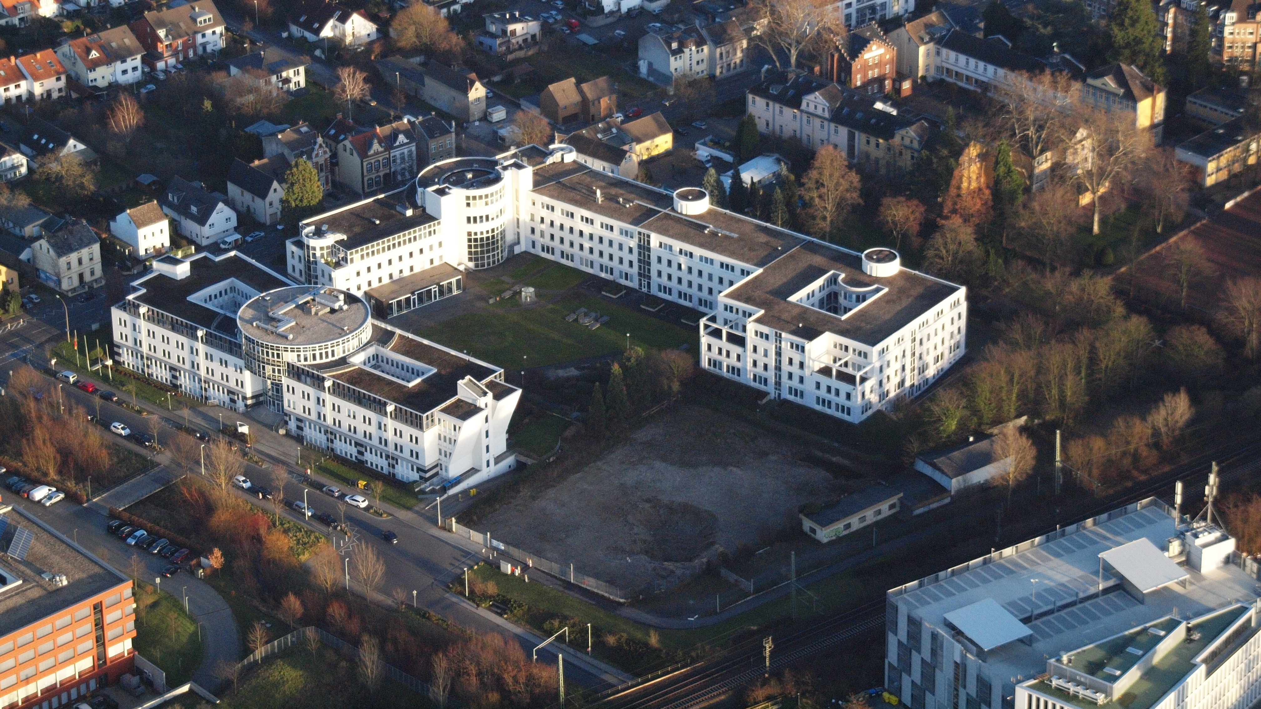 Bundesanstalt für Post und Telekommunikation Deutsche Bundespost, Bonn-Oberkassel: Luftaufnahme